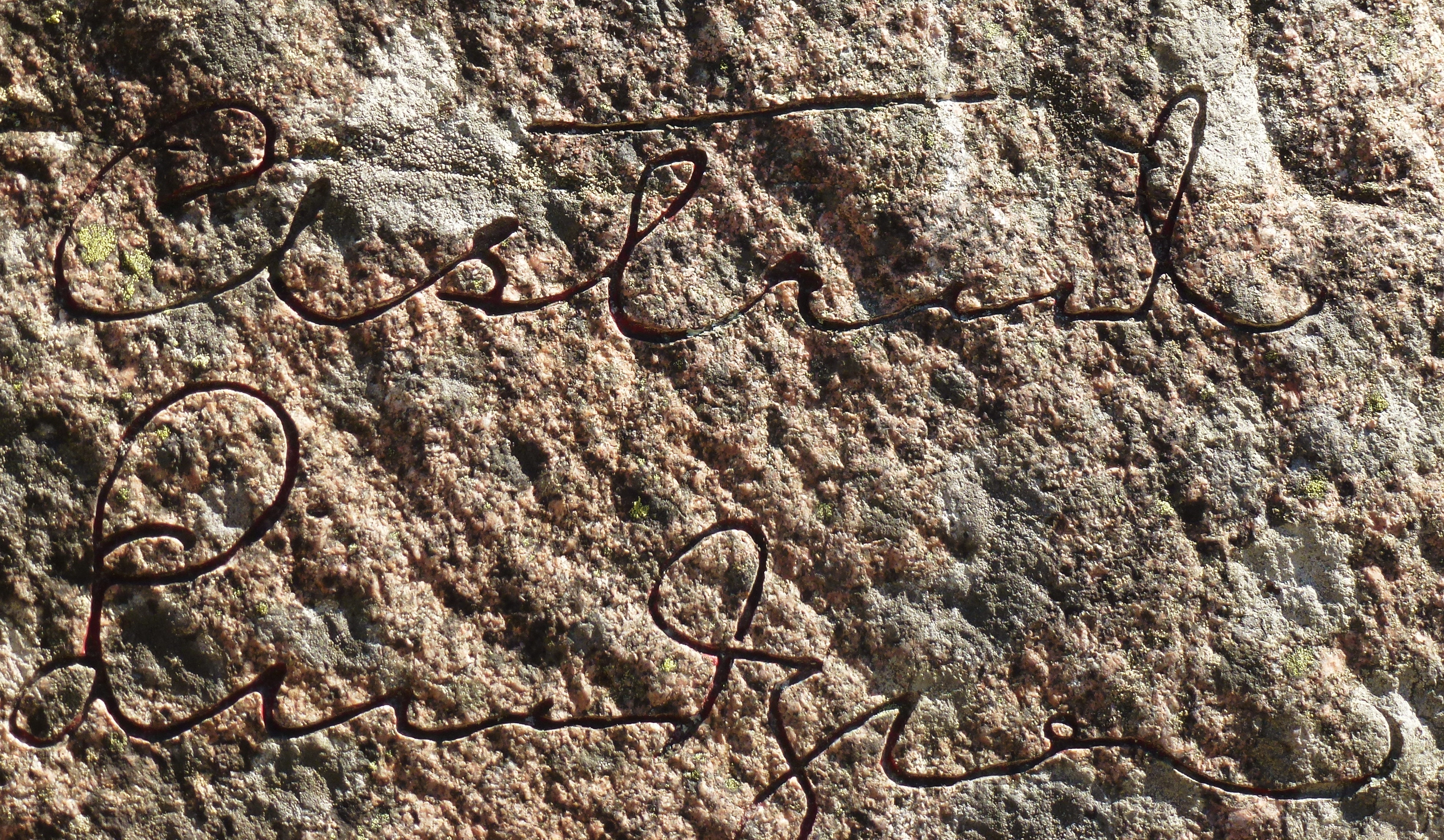 Hansta naturreservat med Astrid Lindgrens berg, namnteckning